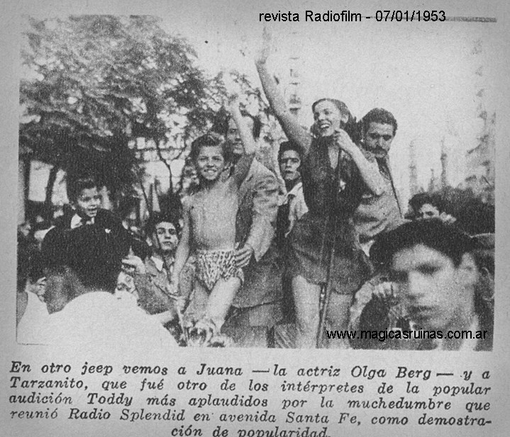 Programa radial argentino donde Oscar Rovito interpretaba a Tarzanito